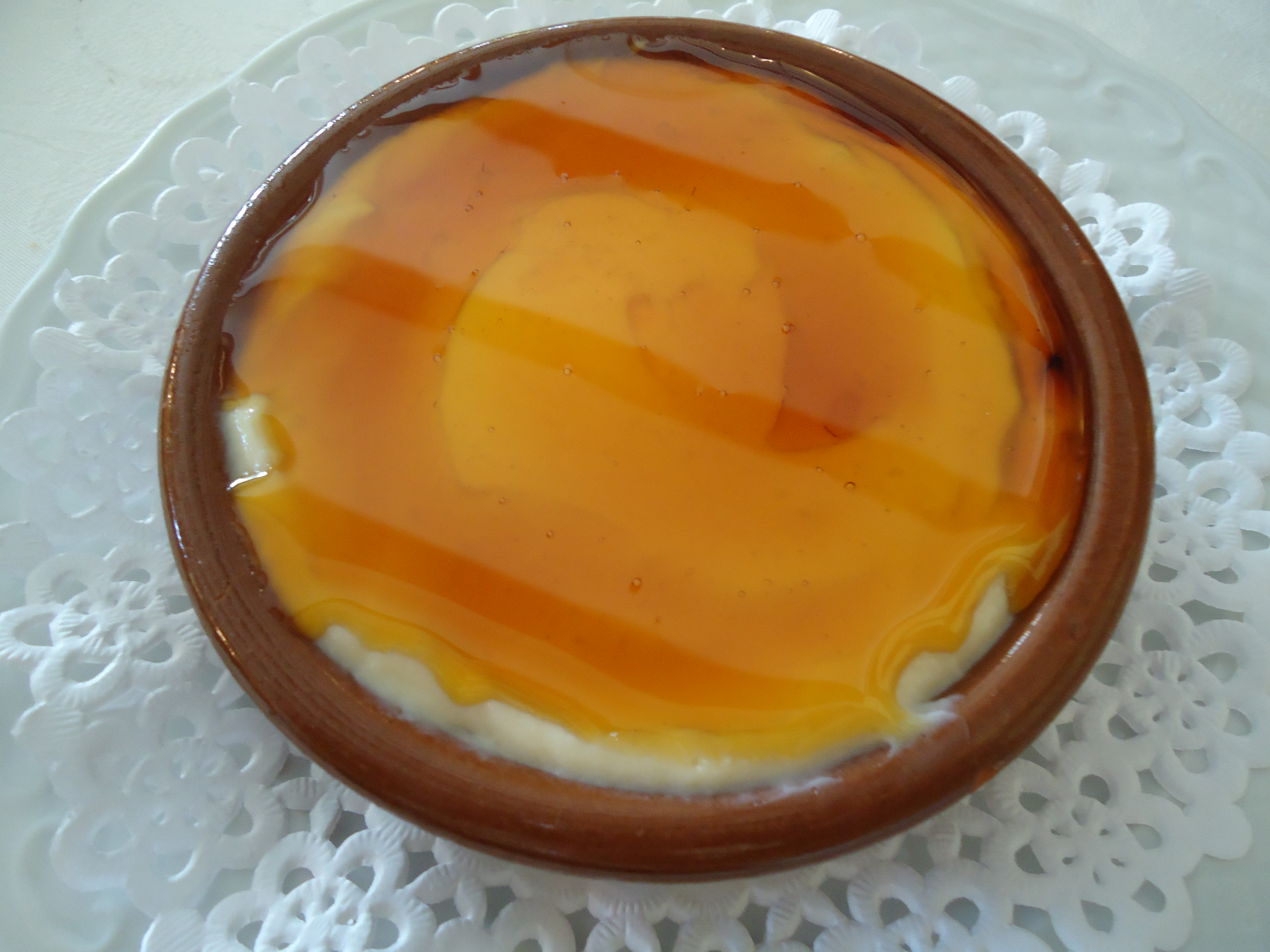 Goxua